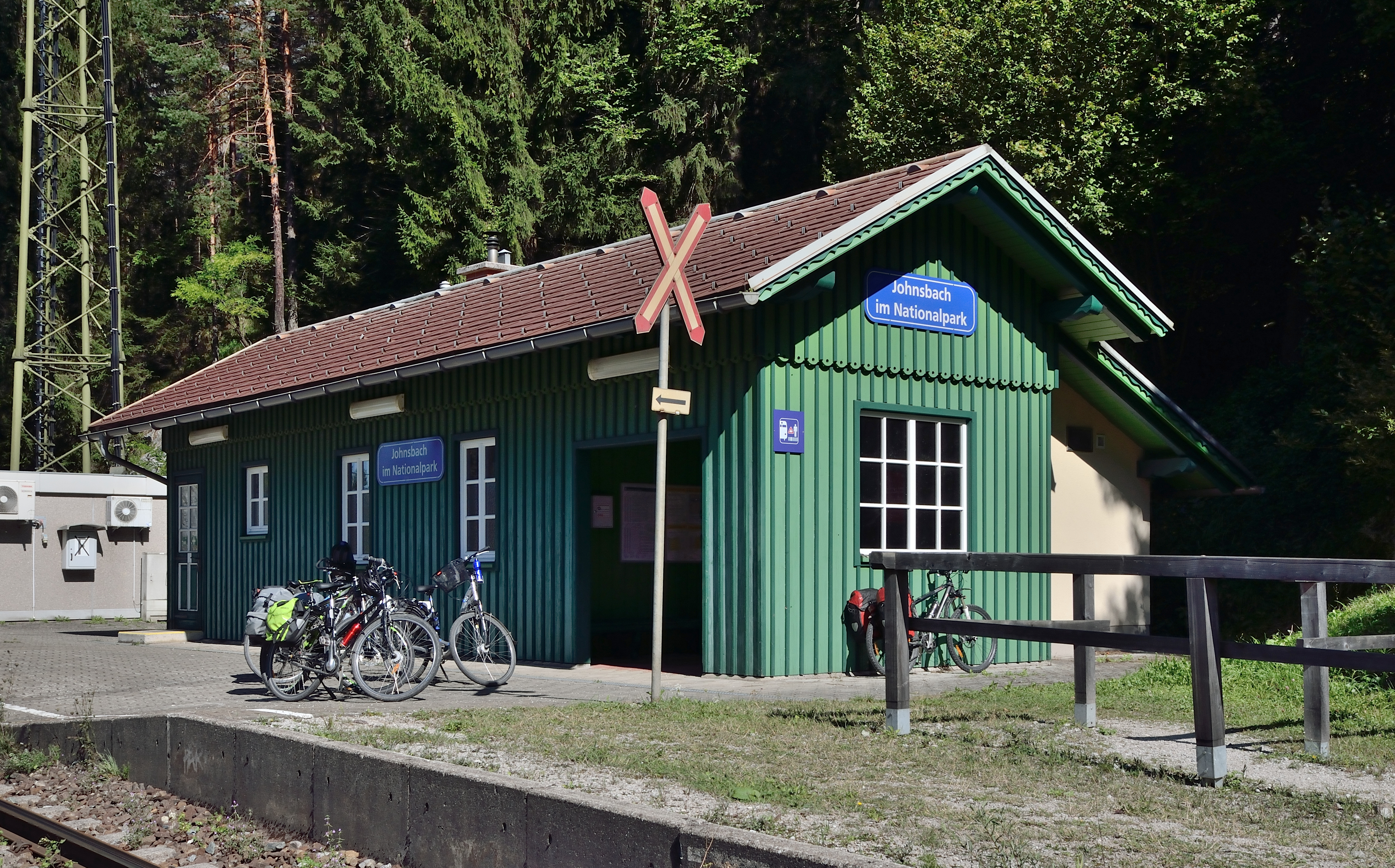 Die Haltestelle Johnsbach der Rudolfsbahn im Ennstal, bei der Abzweigung des Johnsbachtals vom Ennstal. Bis 2014 Gemeinde Johnsbach, ab 2015 Gemeinde Admont.